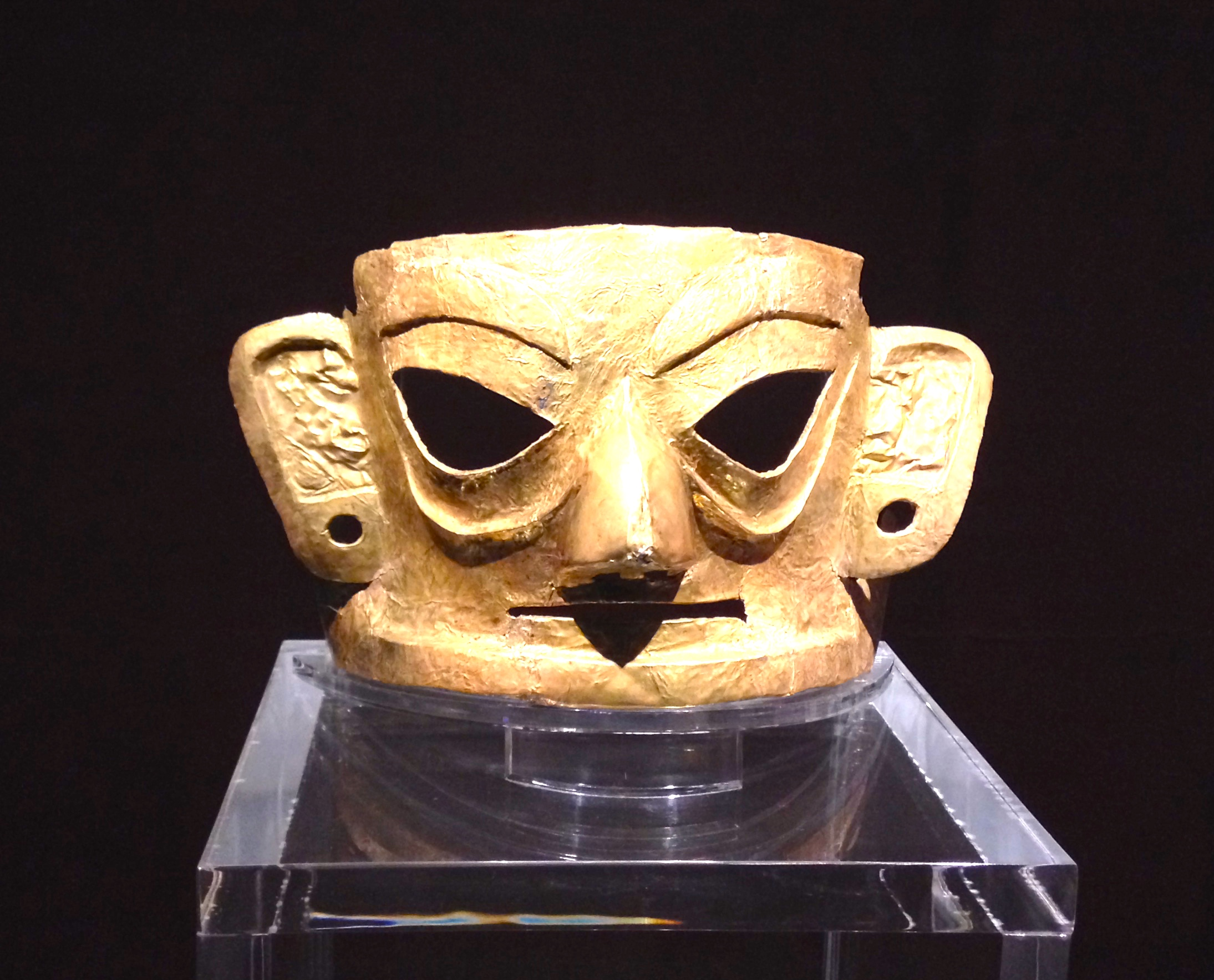 Jinniu, Chengdu, Sichuan, China